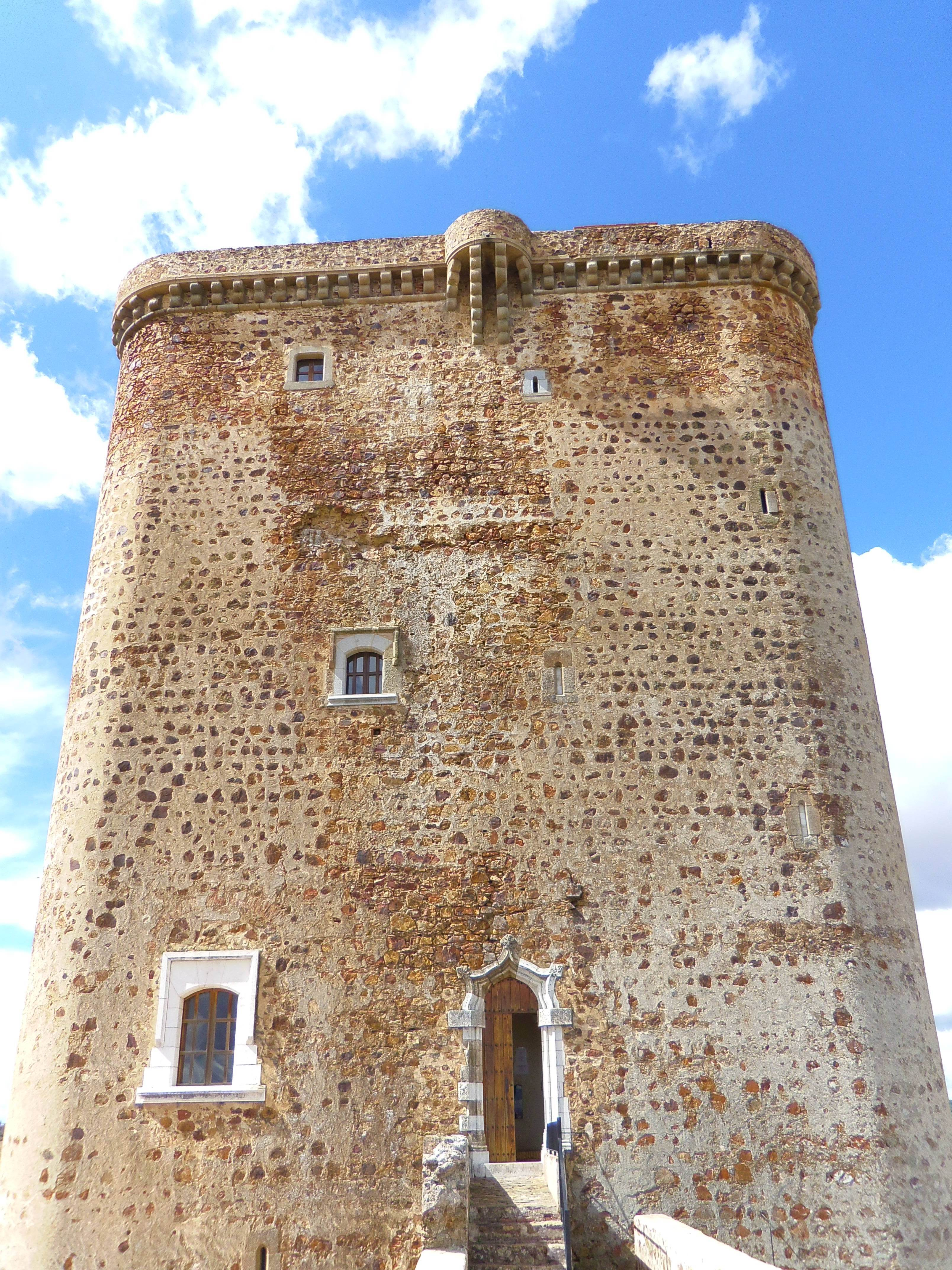 Torre del homenaje fachada de la entrada.